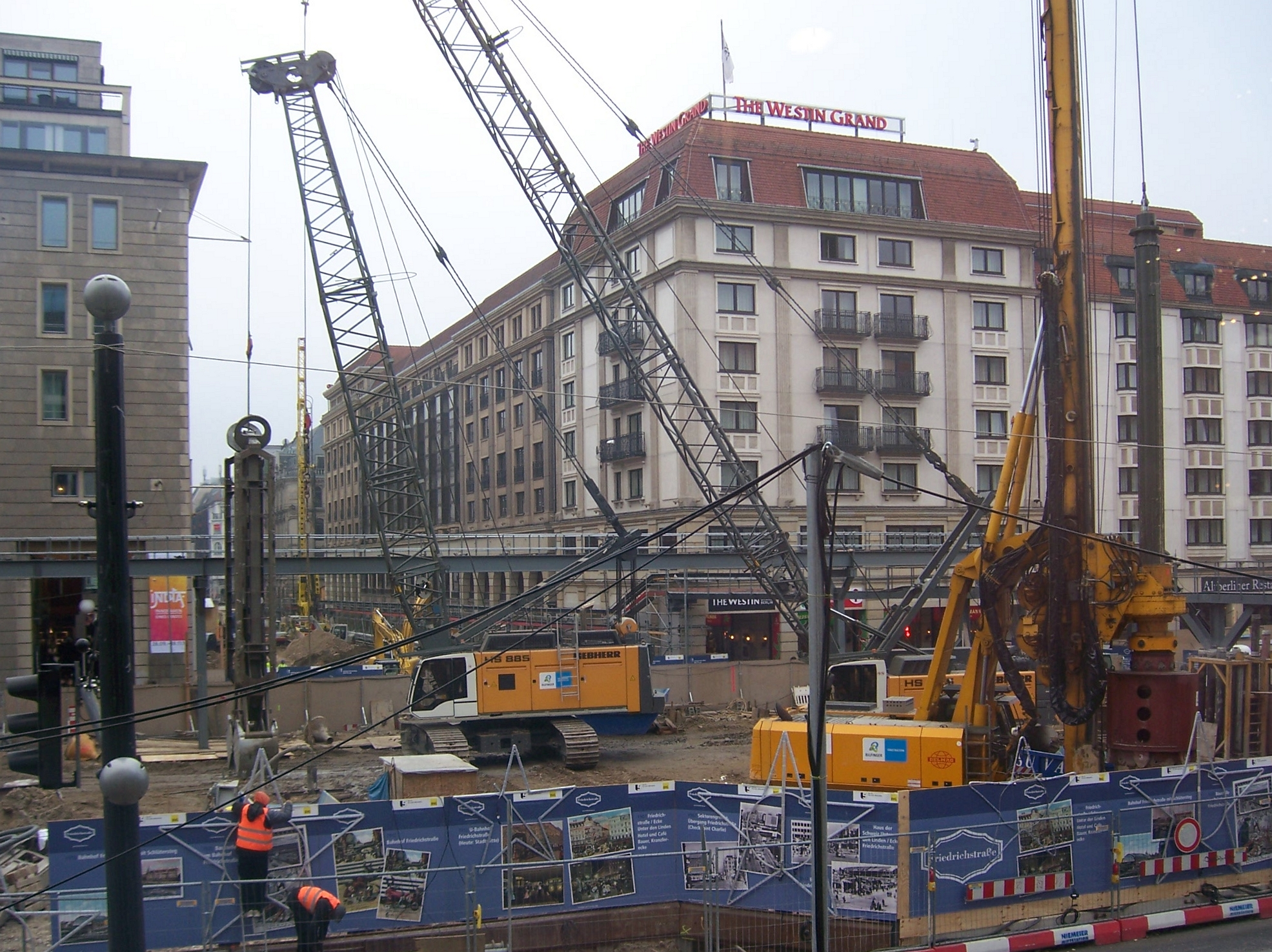 Berlin, Baustelle des U-Bahnhofs Unter den Linden, November 2012